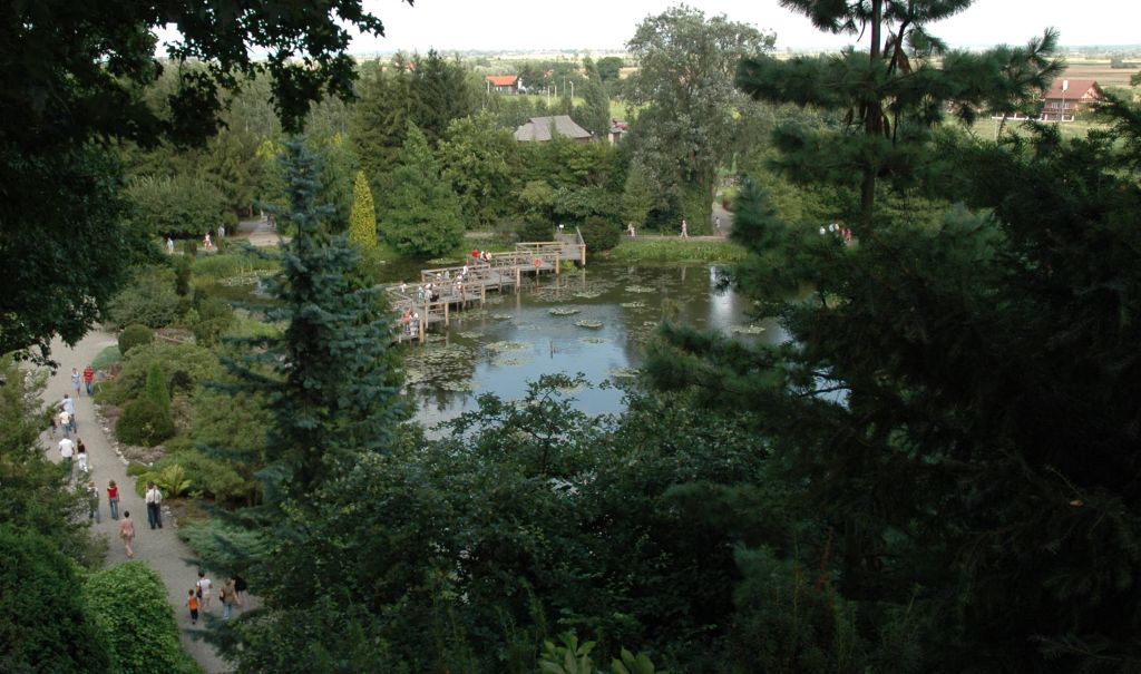 Poland, Bolestraszyce - arboretum.